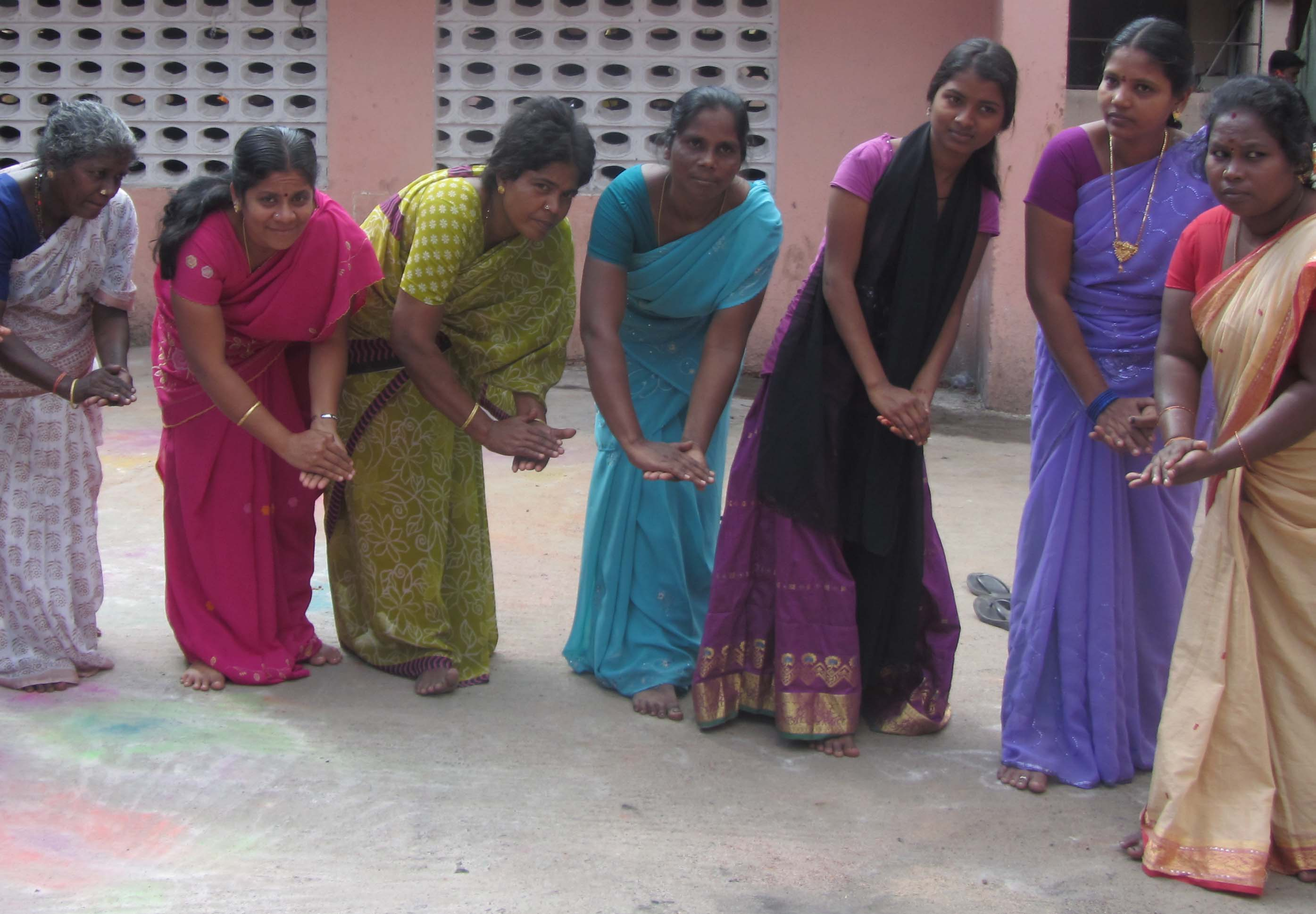 கும்மி பொழுதுபோக்குக் கலைவிளையாட்டு. நாட்டுப்புற மகளிர் ஆட்டம்.